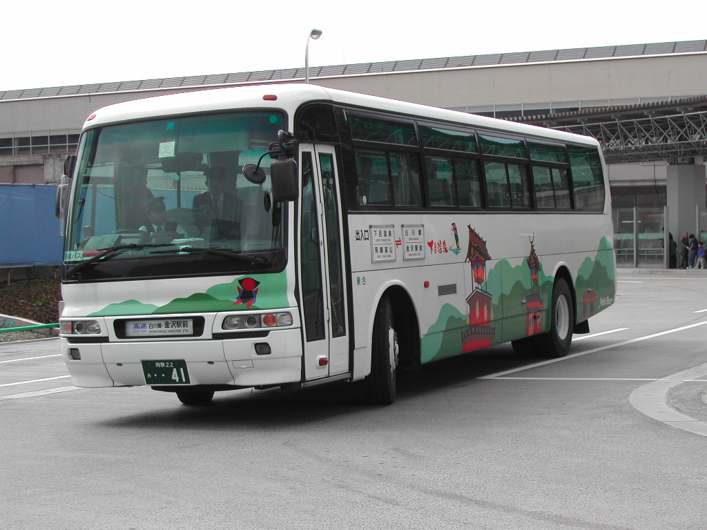 金沢駅前にて 2002-3-30撮影